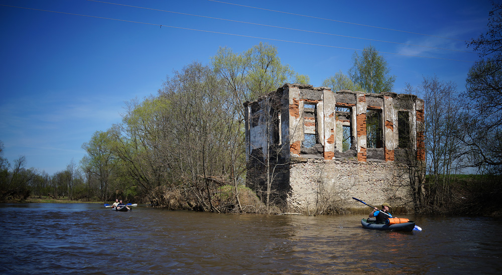 Финеевская ГЭС (Россия, Владимирская область, река Киржач)